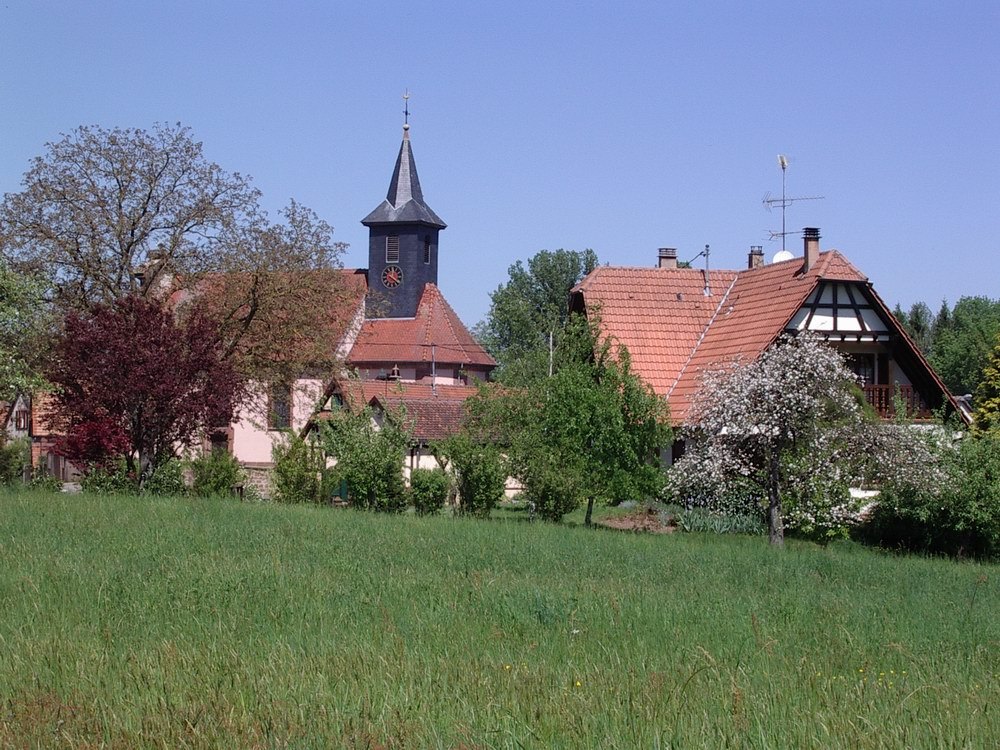 Menchhoffen